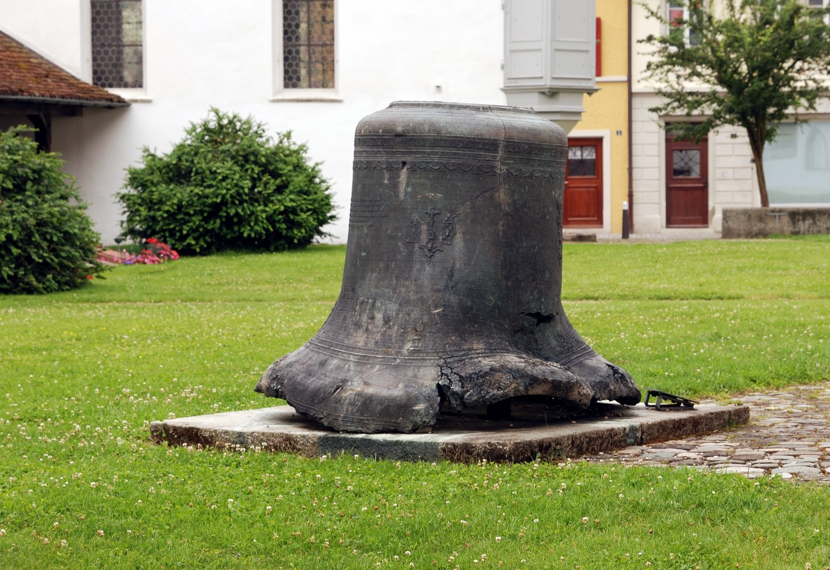 Stadtkirche Bremgarten: Vom Brand übrig gebliebene Glocke, heute neben der Kirche aufgestellt